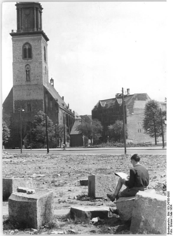 ADN-Zentralbild- Greiser ,25.5.1954 Berlin im Mai 1954 UBz: Sonntagvormittag an der Marienkirche